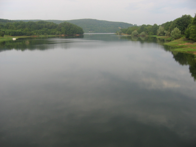 Paysage du Morvan, Bourgogne, France : vue du lac de Pannecière